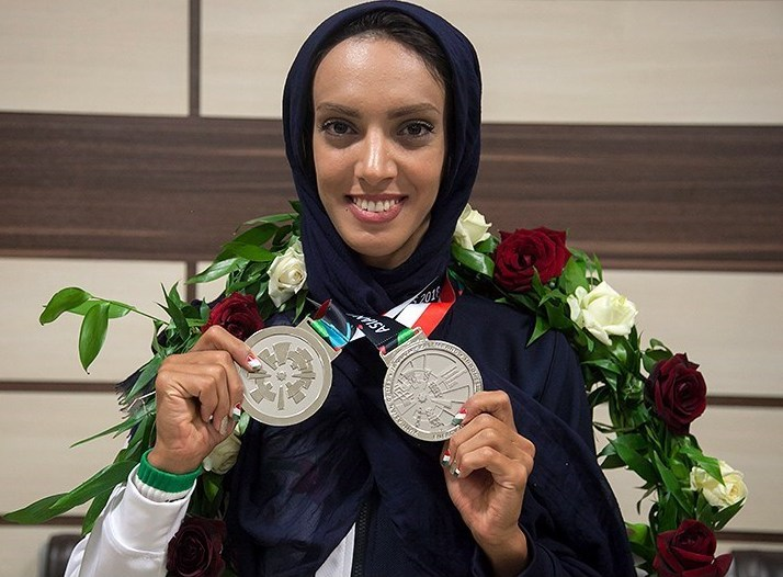 مراسم استقبال از نازنین رحمانی قایقران کرمانشاهی و دارنده ۲ مدال نقره بازیهای آسیایی ۲۰۱۸ جاکارتا در فرودگاه شهید اشرفی اصفهانی کرمانشاه